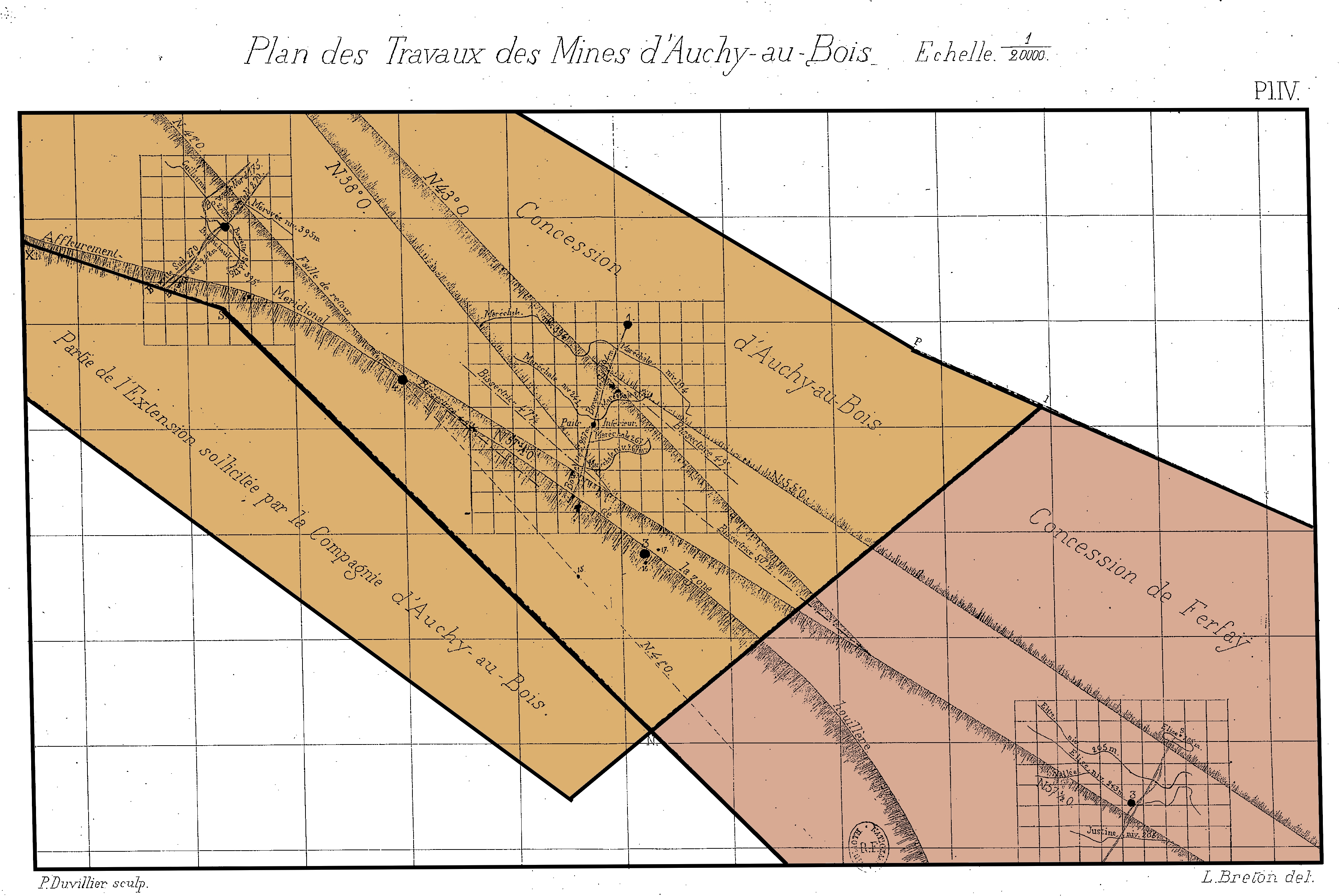 Plan des travaux de la Compagnie des mines d'Auchy-au-Bois vers 1877.